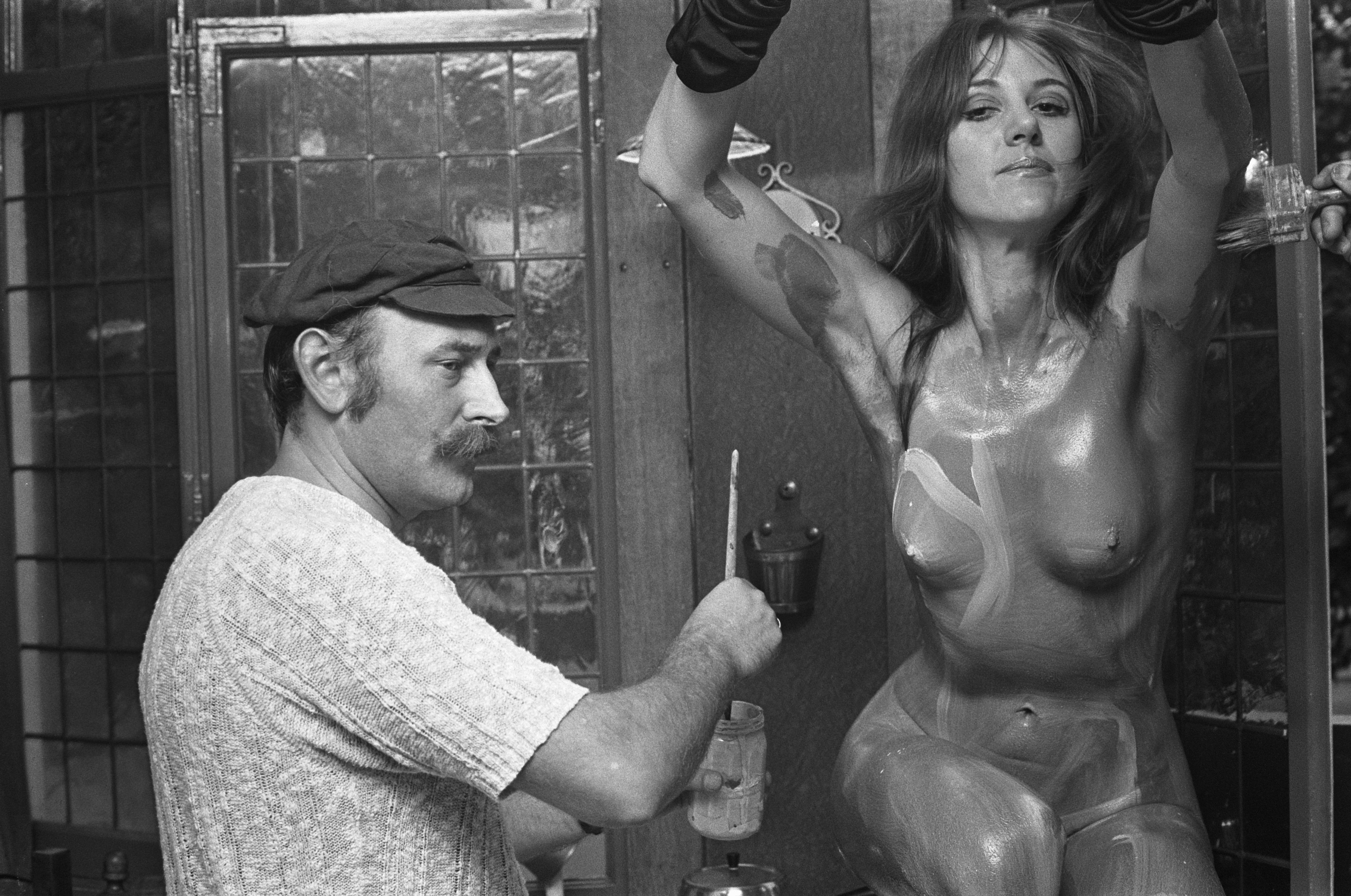 Collectie / Archief : Fotocollectie Anefo Reportage / Serie : [ onbekend ] Beschrijving : Cor Jaring beschildert naakte juffrouw, Amsterdam Datum : 10 september 1969 Locatie : Amsterdam, Noord-Holland Persoonsnaam : Cor Jaring Fotograaf : Verhoeff, Bert / Anefo Auteursrechthebbende : Nationaal Archief Materiaalsoort : Negatief (zwart/wit) Nummer archiefinventaris : bekijk toegang 2.24.01.05 Bestanddeelnummer : 922-7795